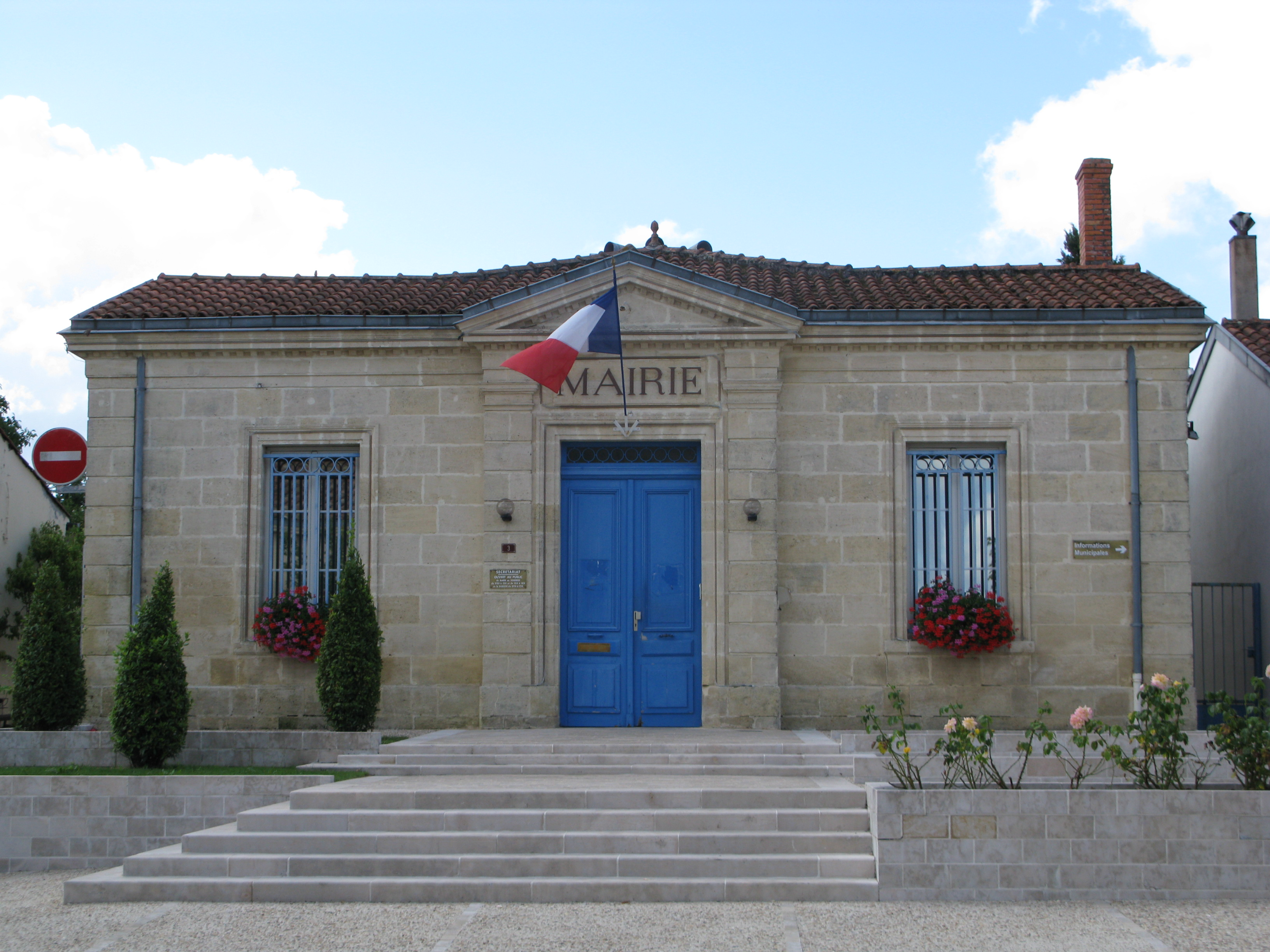 La mairie d'Avensan